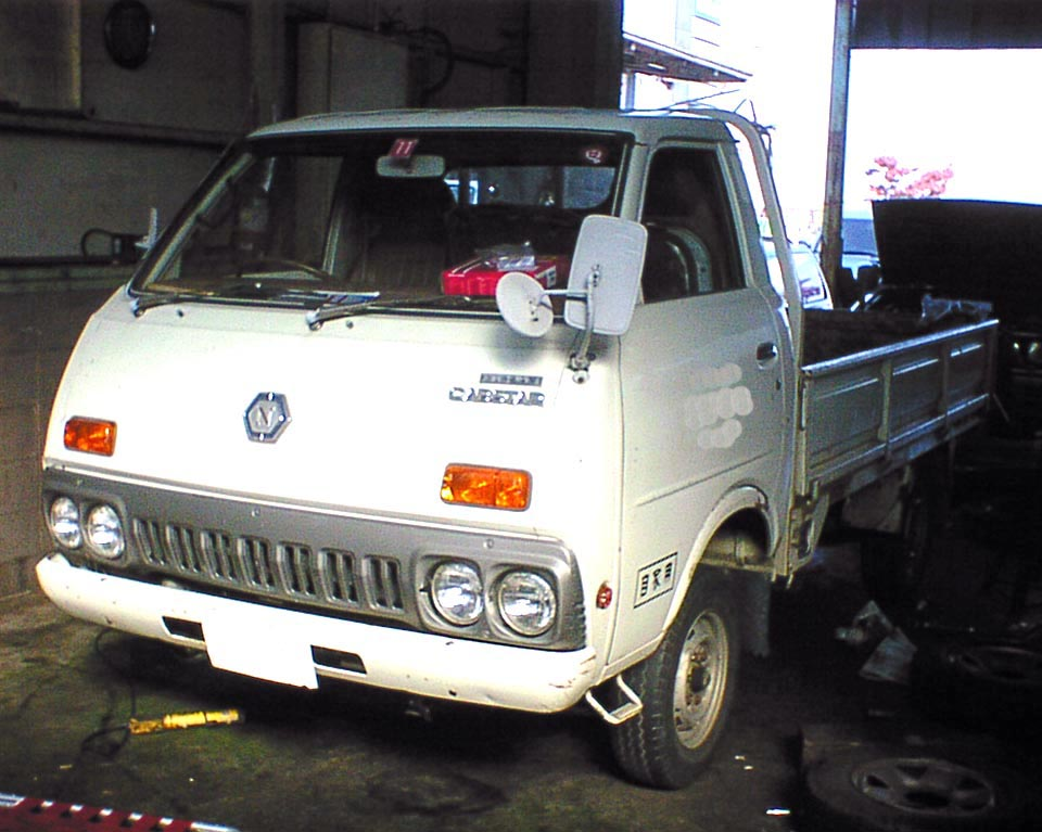 日産キャブスター